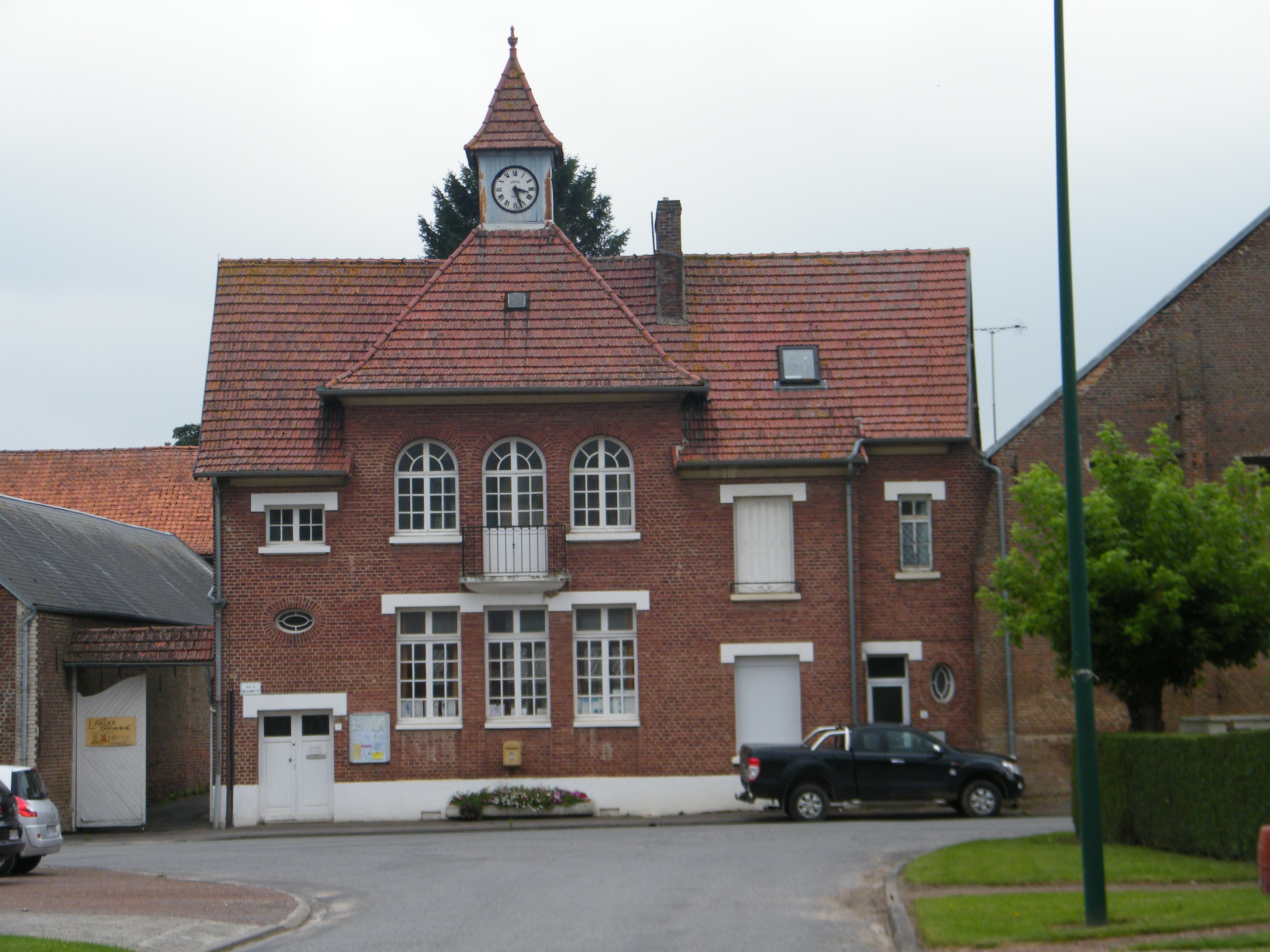 Mairie.